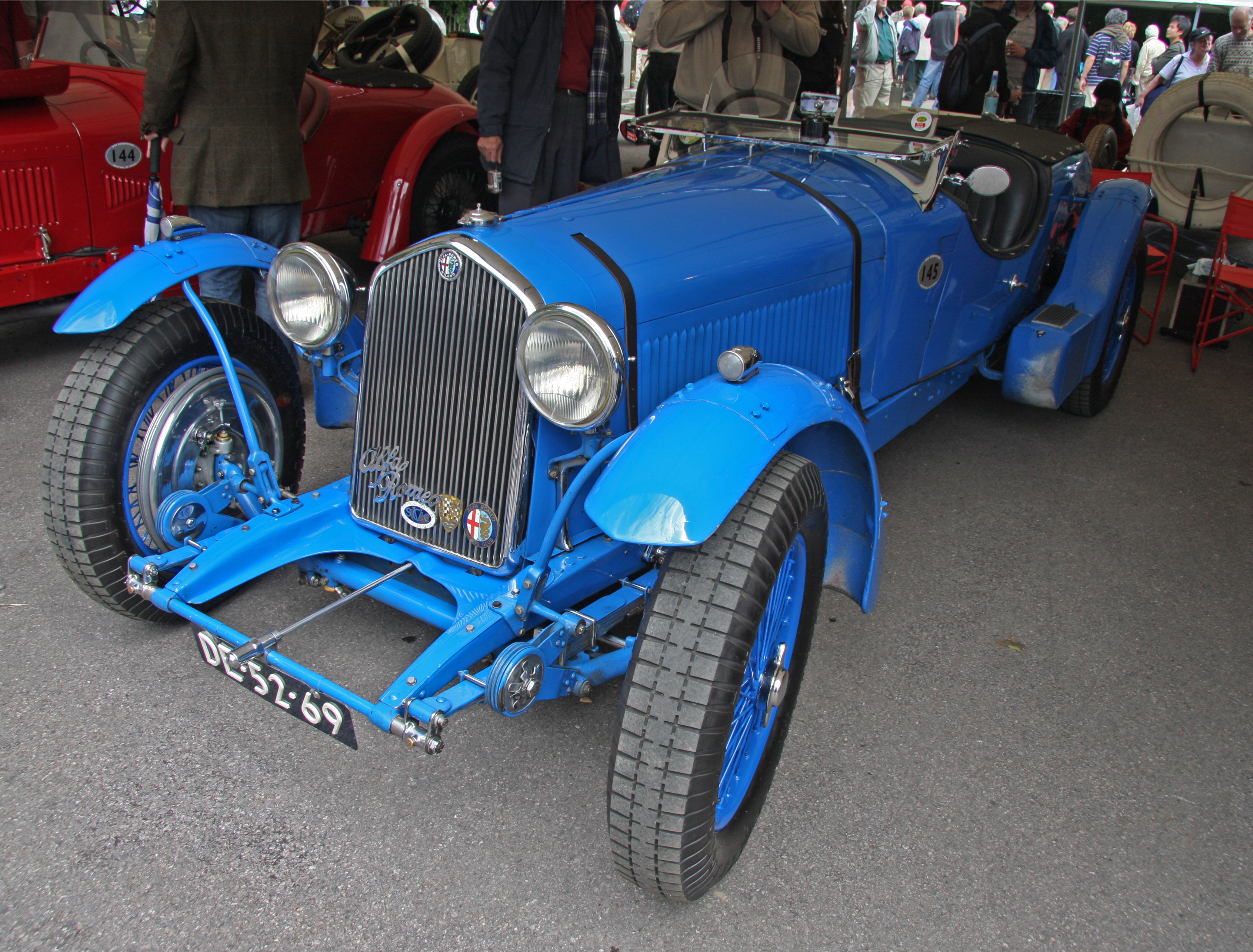 Built 1933. 2.3 litre 8 cylinder